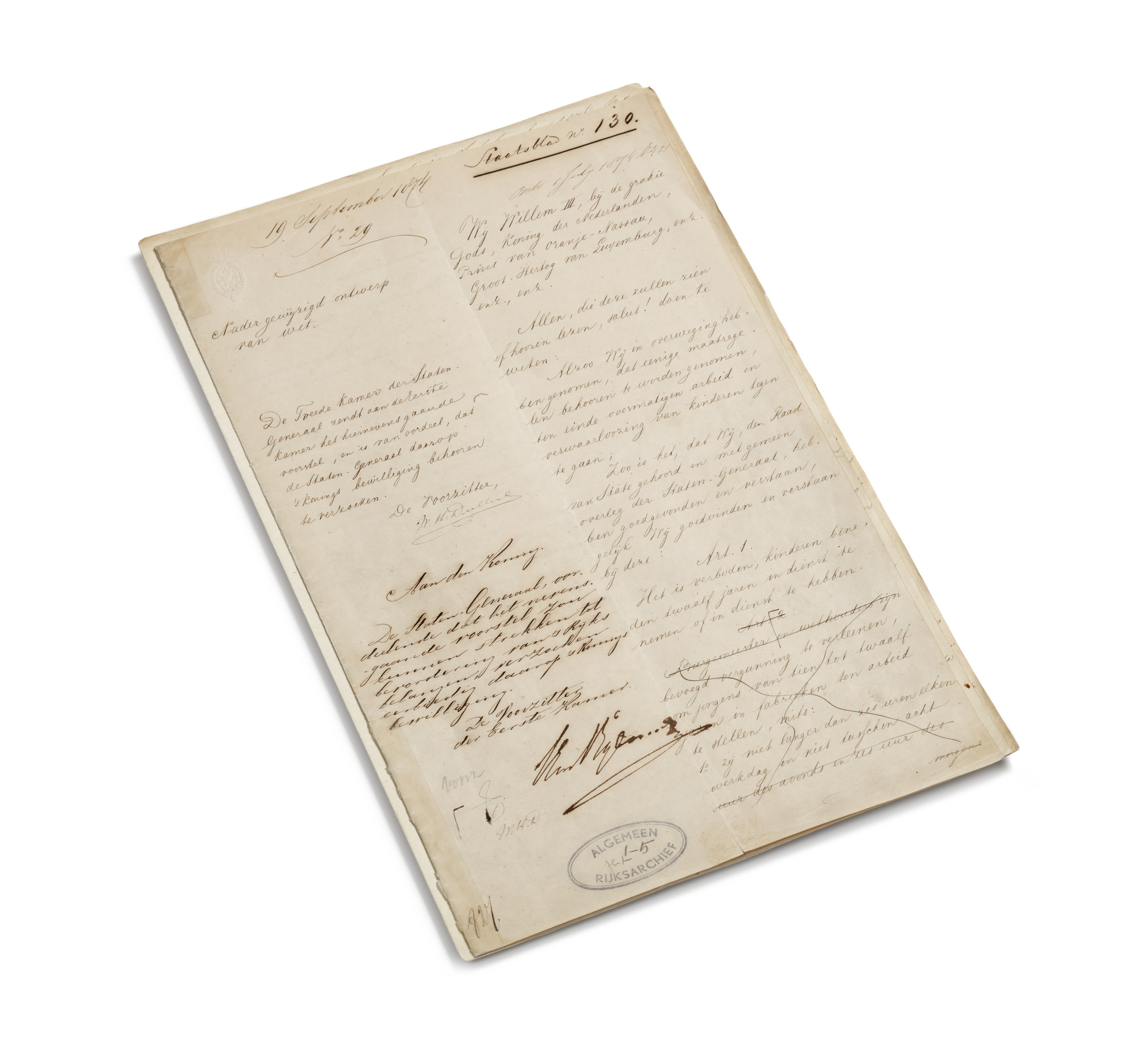 Kinderwetje Van Houten (leerplichtwet 1901), Kabinet des Konings, Kabinet der Koningin, inventarisnummer 2071B